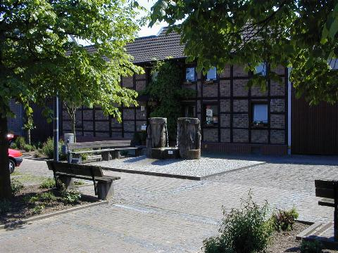 GNU, eigenes Foto